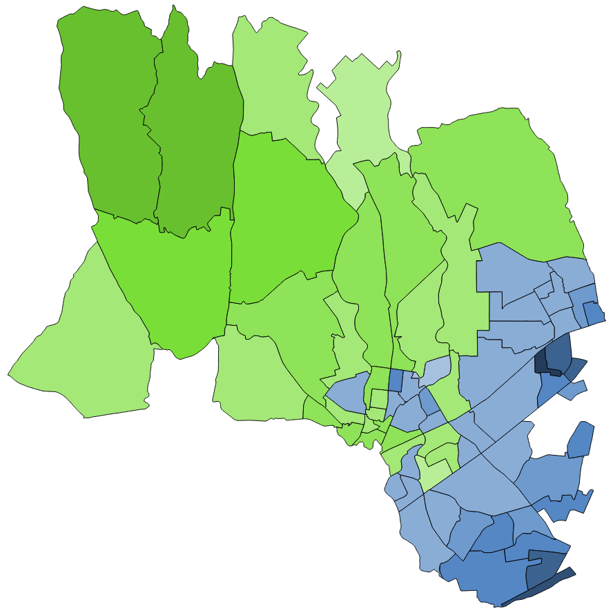 中文（台灣）: 顏色對照表